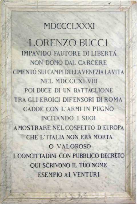 Lapide di Lorenzo Bucci nell'atrio del Comune di Montecarotto